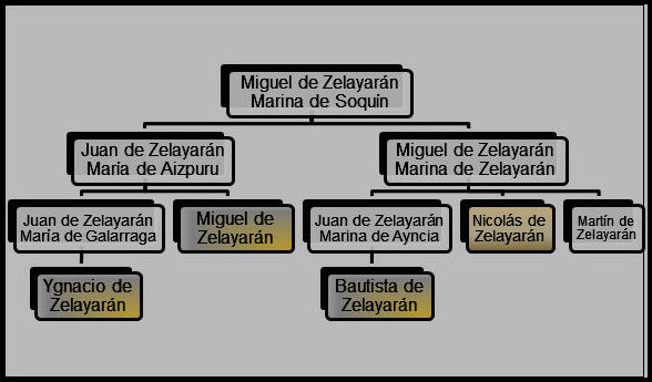 Esquema genealógico de parte de la descendencia de Miguel de Çelayarán y Marina de Soquín